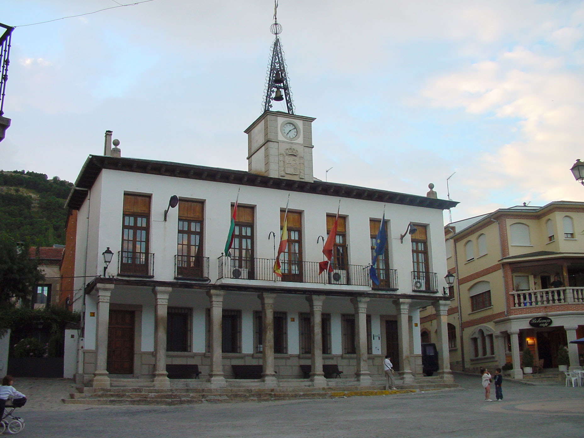 Ayuntamiento de Miraflores de la Sierra